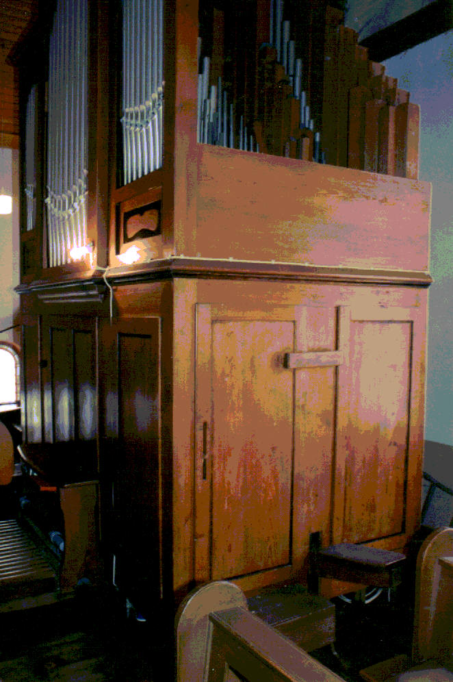 Ehemalige Horn-Orgel in Oberahr (1919) - Kalkantentritt (Veröffentlichungsgenehmigung am 17.6.2014 durch Pfarrbüro Niederahr erteilt)